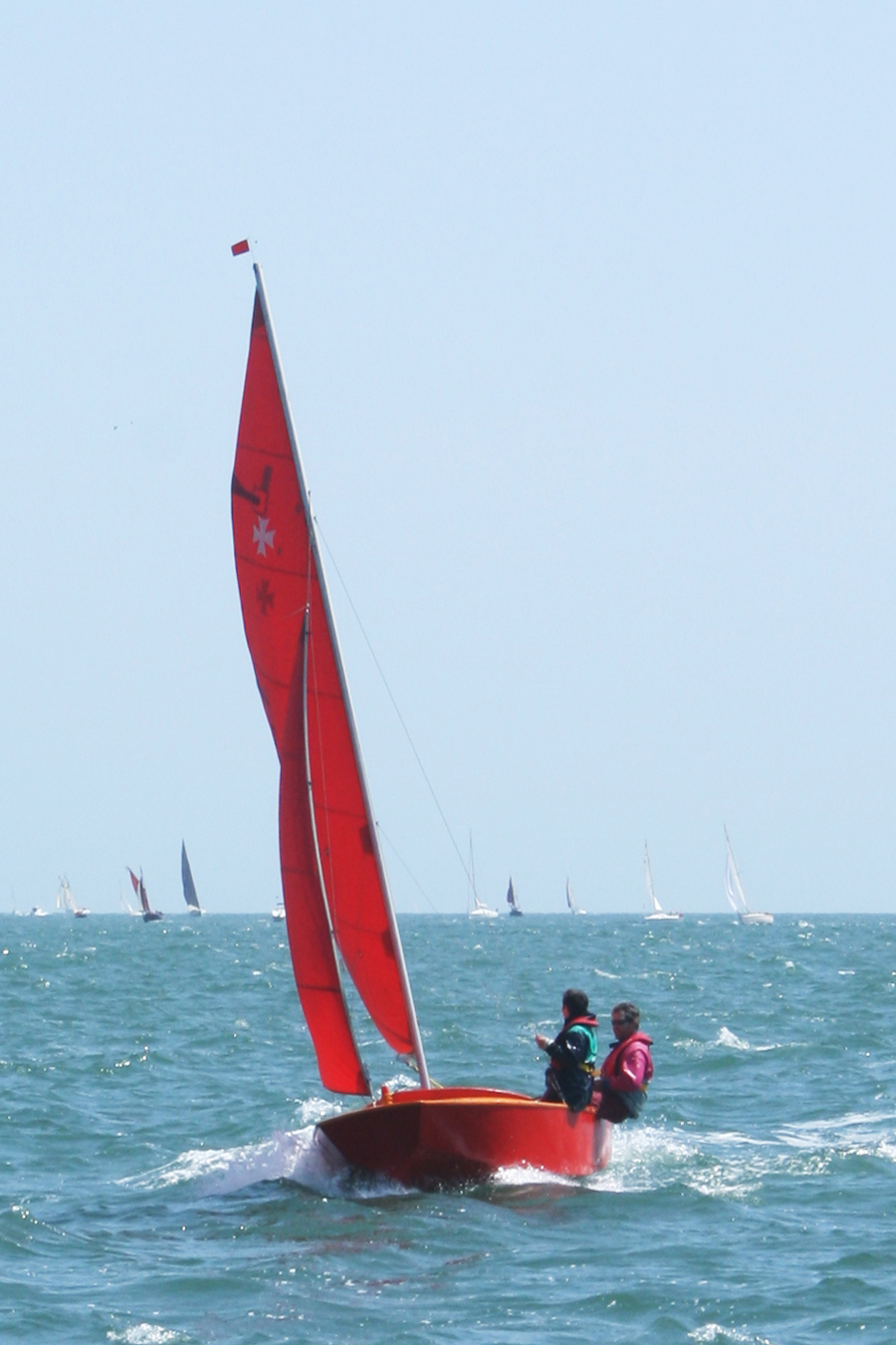 Caravelle